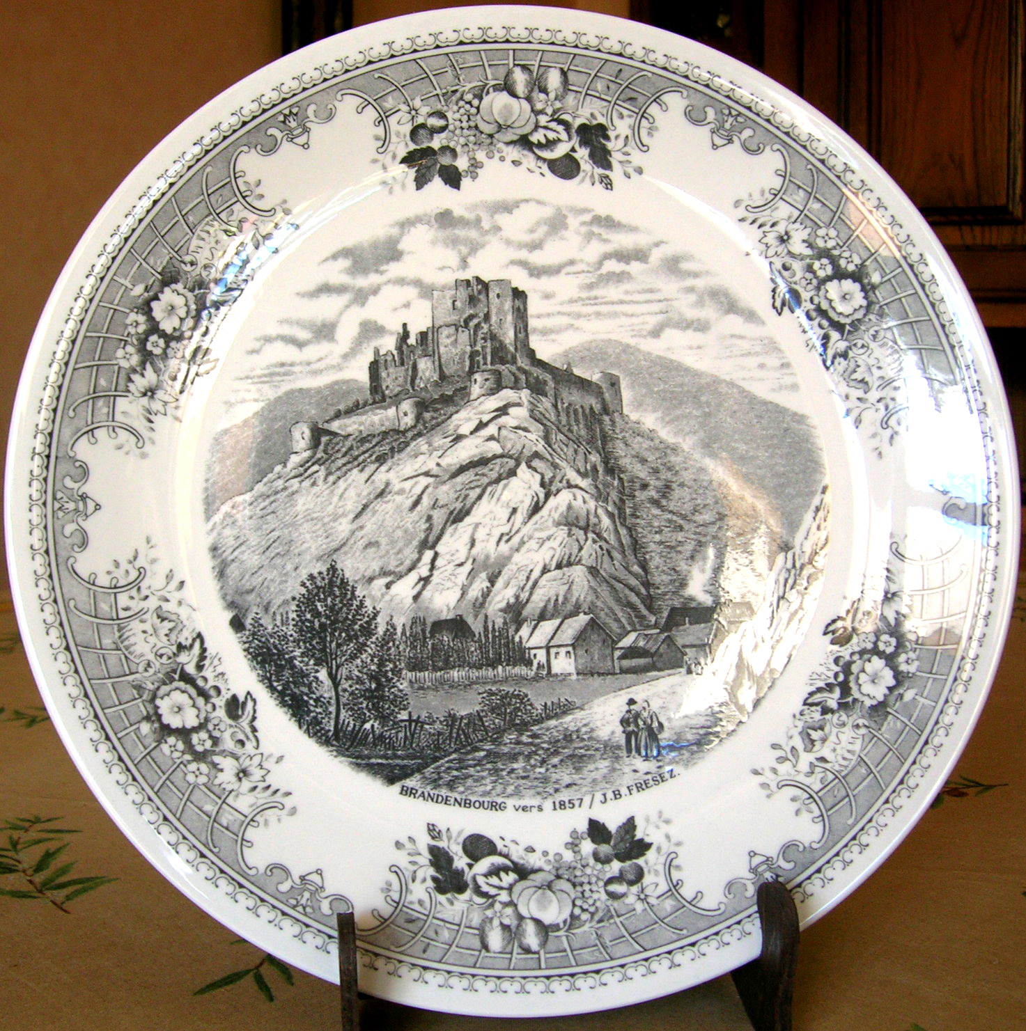 Branebuerg géint 1857,Teller vun der Faïencerie vu Septfontaine no enger Zeechmung vum J.-B. Fresez .